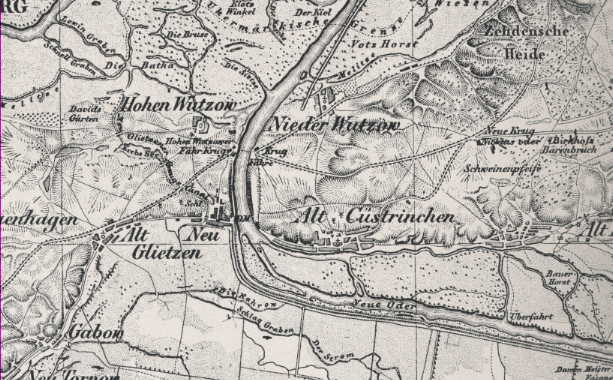 Koppinsche Karte